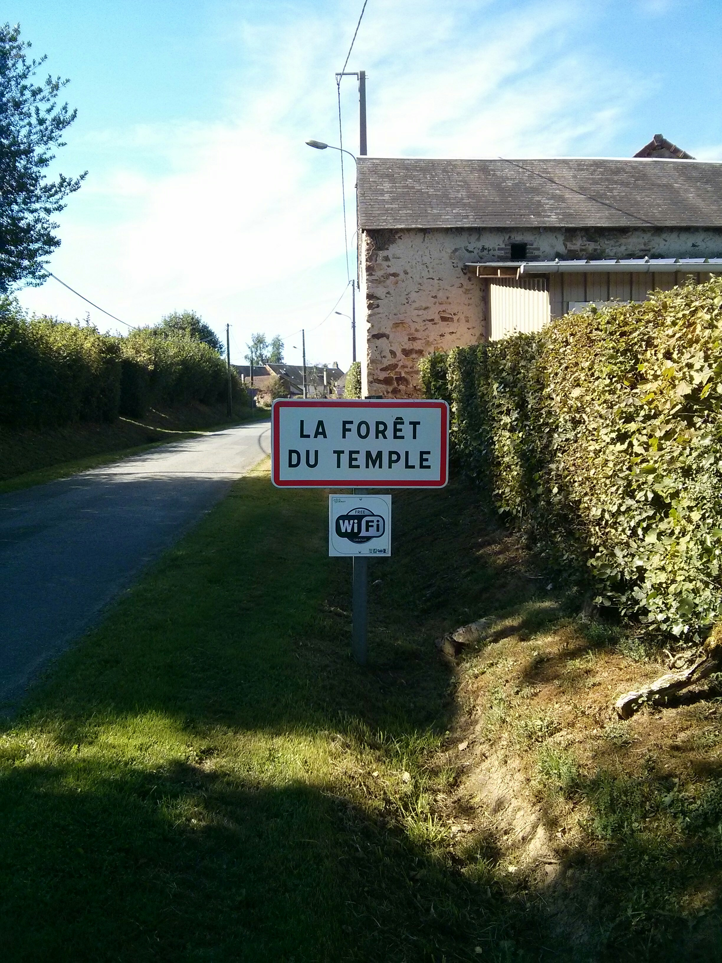 Un des panneaux routiers signalant l'entrée du village de la Forêt-du-Temple (ici rue du Puits), Creuse, Limousin, France, au sein de la commune du même nom.